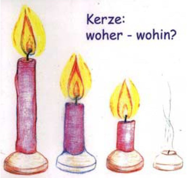 Vier verschieden lange Kerzen (woher?-wohin?), Lehrstück Faradays Kerze, Susanne Wildhirt